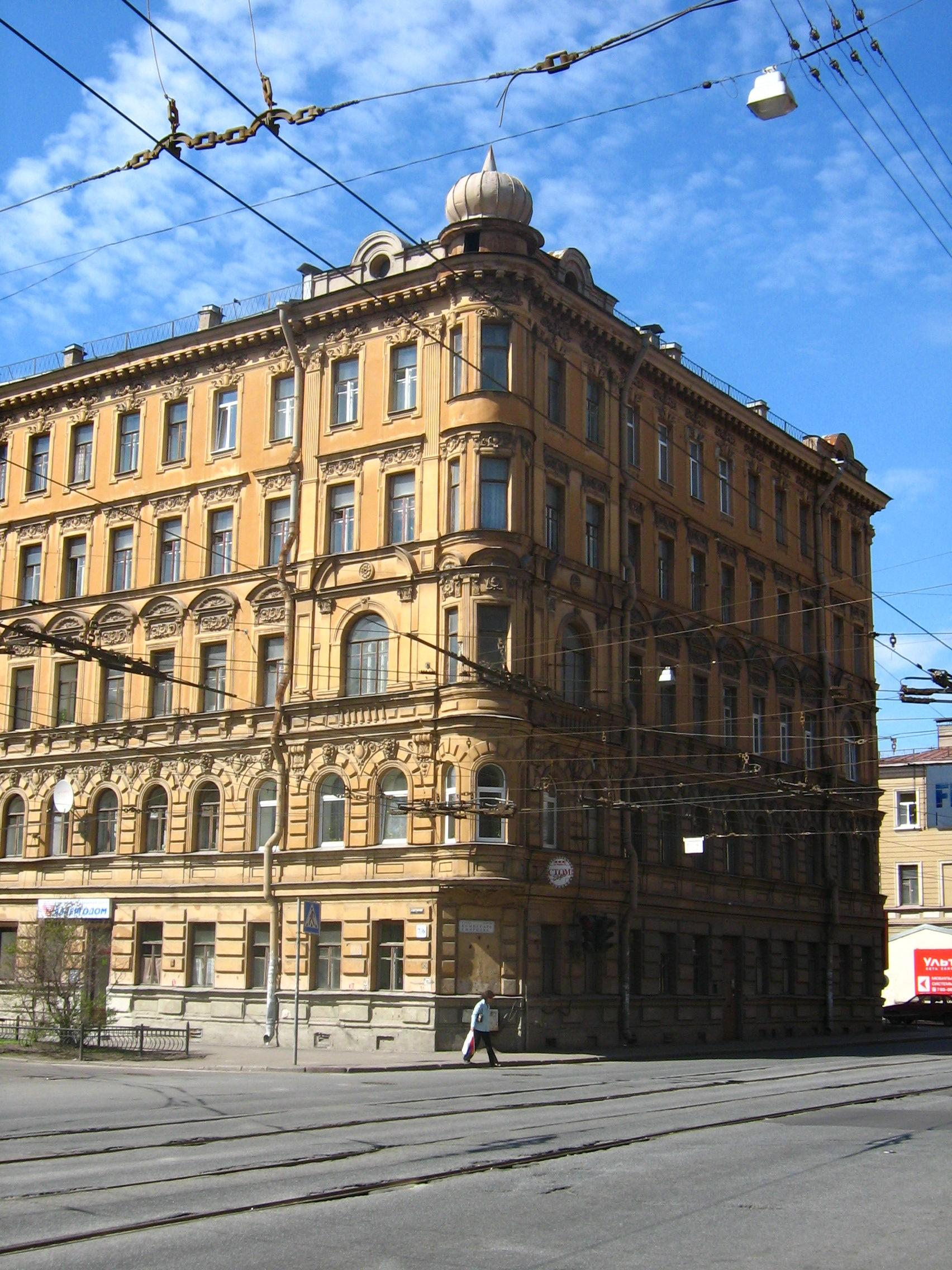 Lesnoy avenue - Komissara Smirnova Street (St.-Petersburg, Russia)